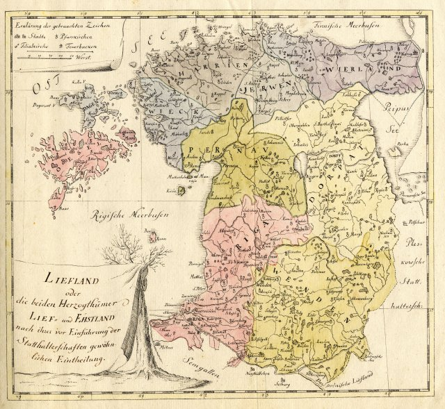 Scan from Johann Christoph Brotze's book Sammlung verschiedner Liefländischer Monumente. Liefland oder die beiden Herzogthümer Lief und Ehstland ... [die Karte].